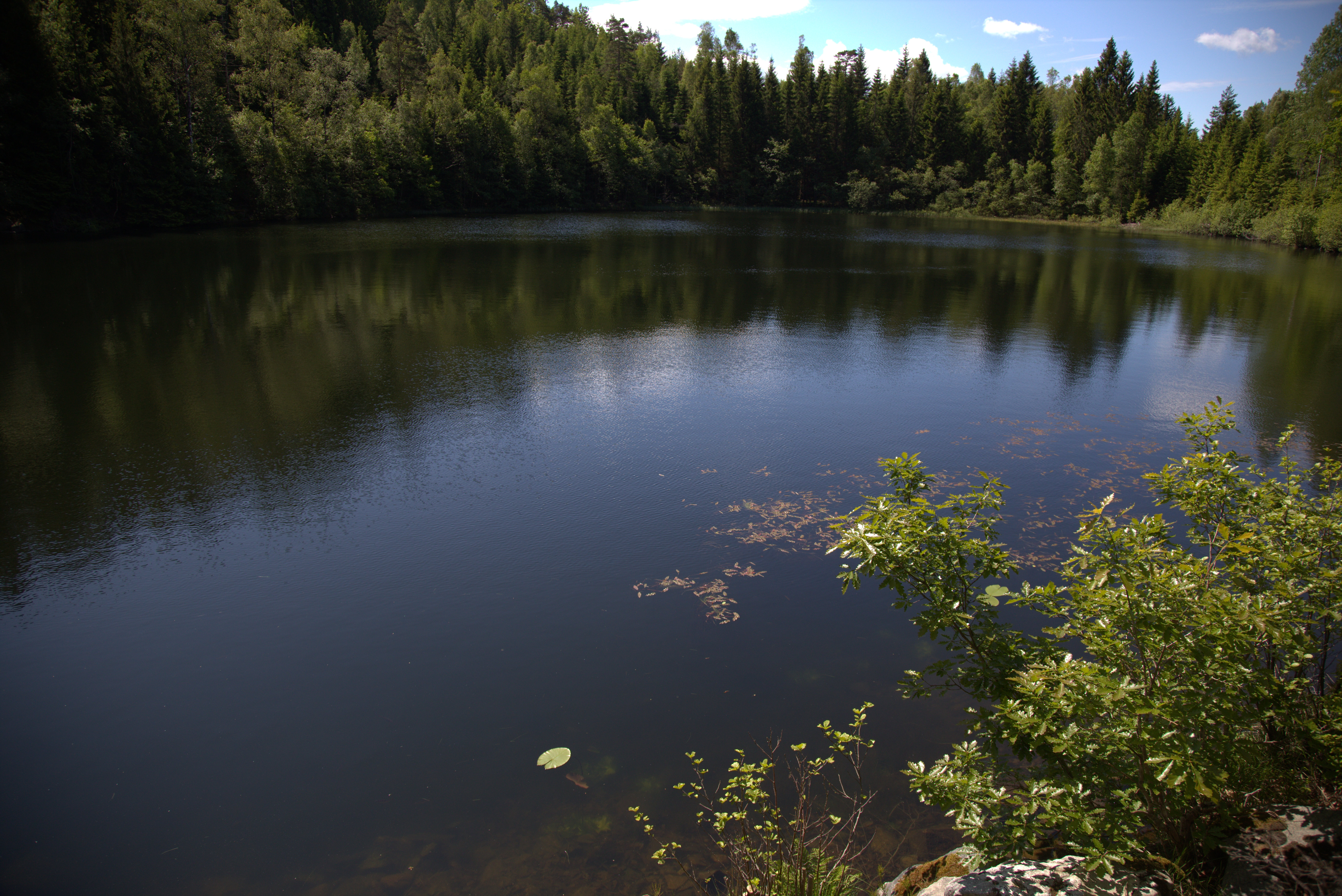 Sjön Stora Gårvattnet sedd från sin nordvästra strand.